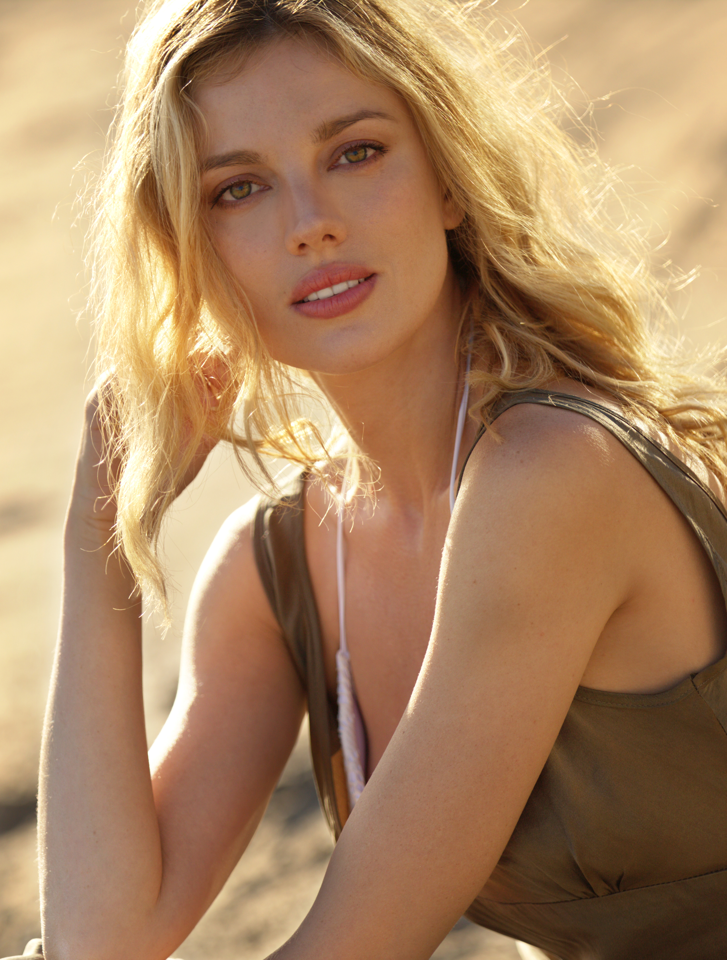 בר פאלי